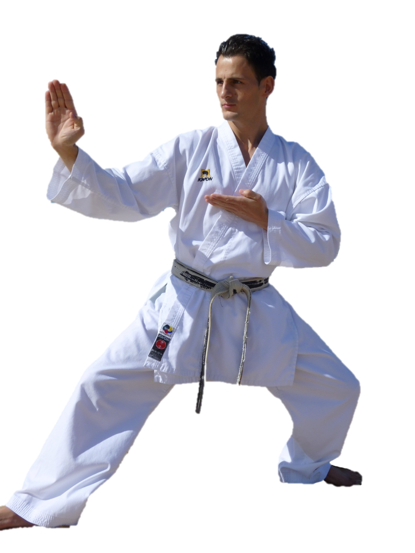 Enis Imeri in Kampfhaltung